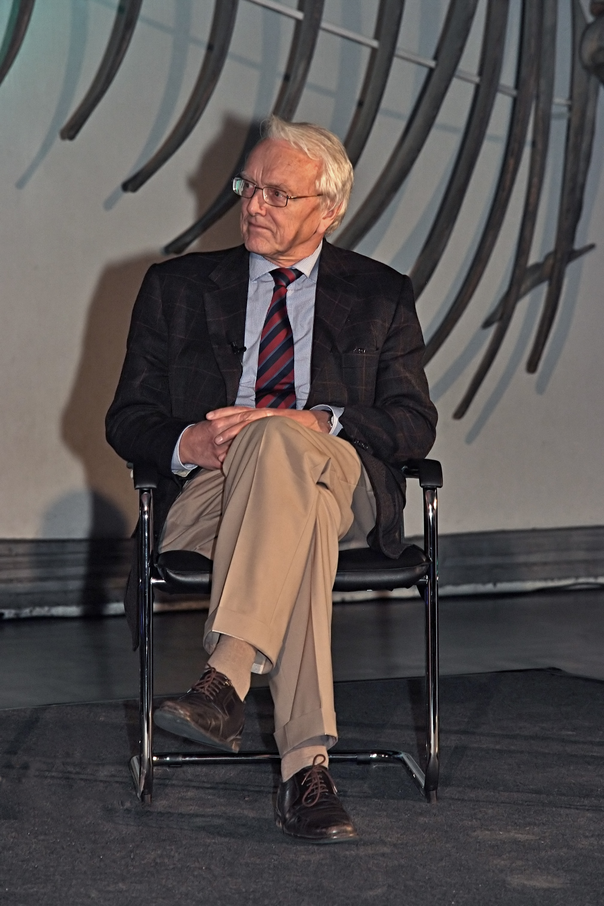 Verleihung der Zedler-Medaille 2009 im Naturmuseum Senckenberg in Frankfurt am Main Michael Stolleis